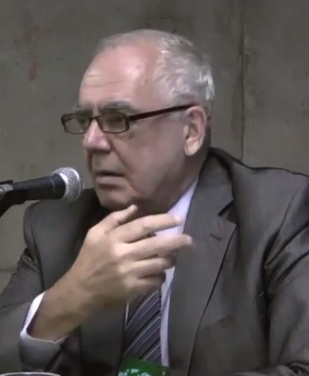 Clemente Herrero Fabregat